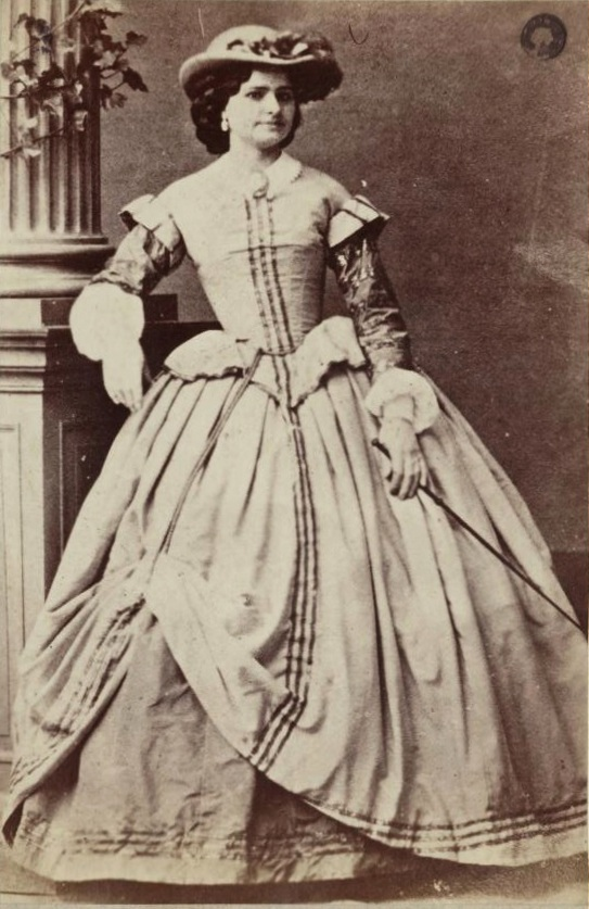 Bronisława Dowiakowska (1840-1910) w kostiumie do partii tytułowej opery Stanisława Moniuszki "Hrabina"